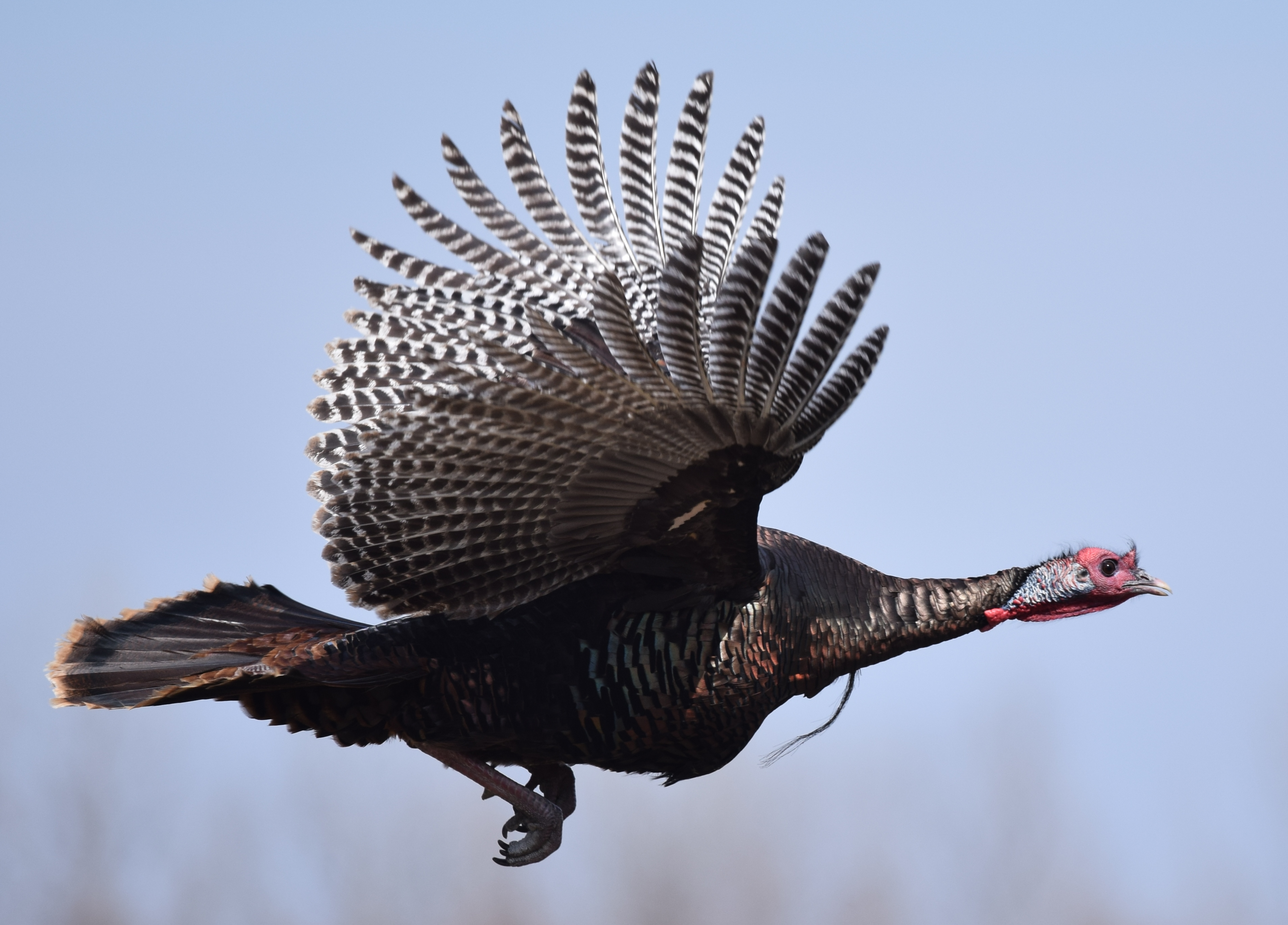 Horseshoe Lake, 3/6/16